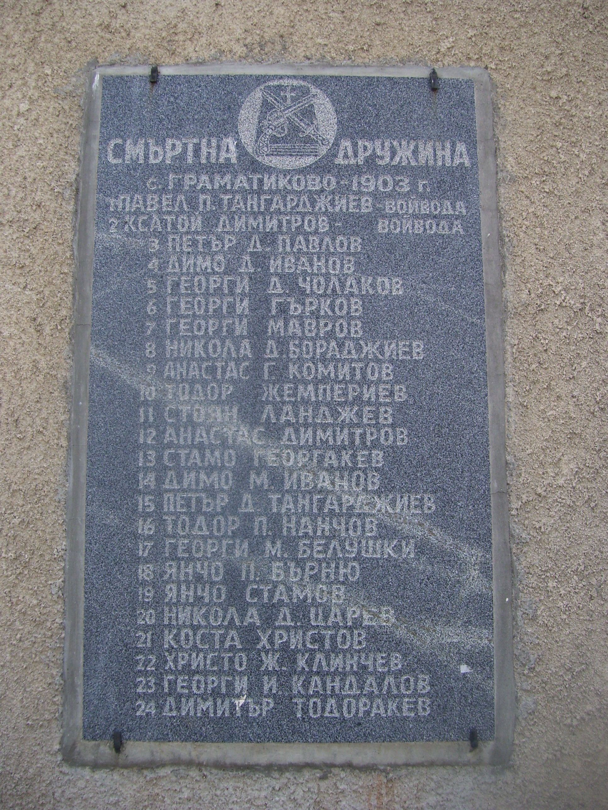 Паметна плоча на смъртната дружина от село Граматиково.